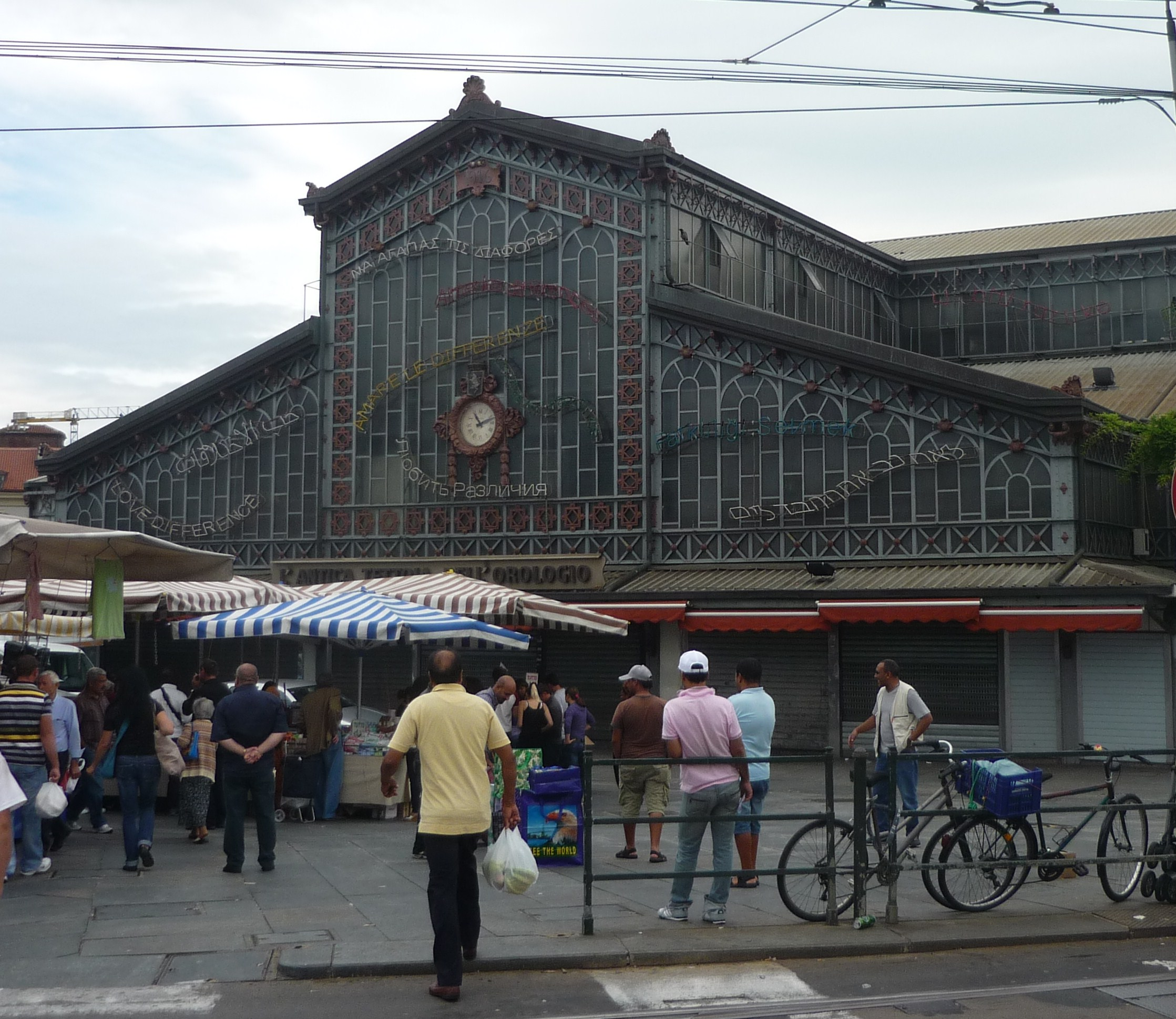 Vue du marché de Porta Palazzo à Turin en Italie.